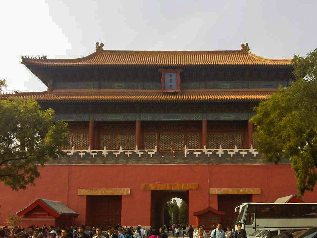 中文（中国大陆）: 北京故宫东华门